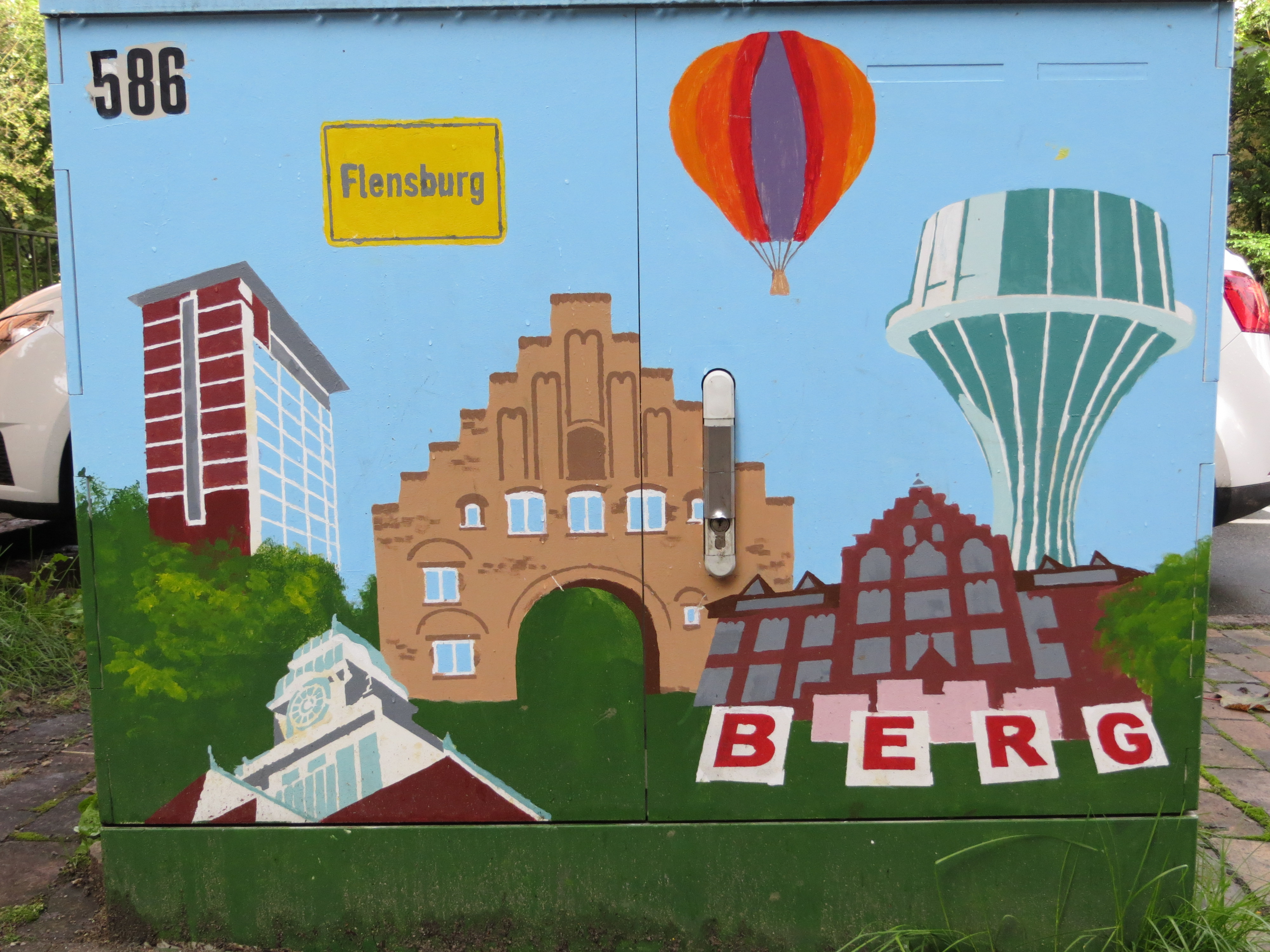 Stromkasten Nr 586, Nordergraben, Mit Flensburg-Motiven Nordetor, Rathaus, Wasserturm, Auguste-Viktoria-Schule sowie eine Maus, Bild 2; gleich bei der kath. Kirche